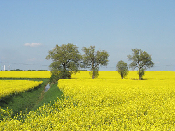 near Gransee in Brandenburg